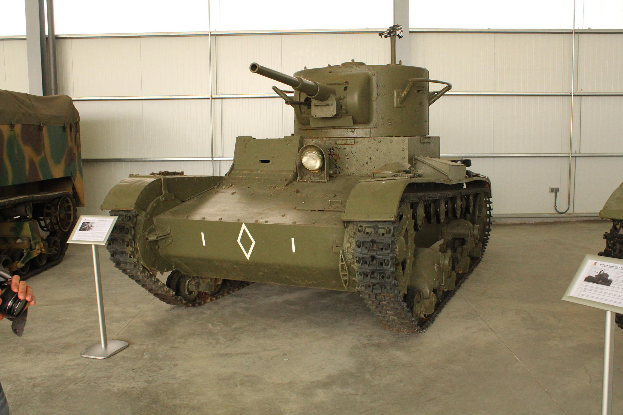 Tanque ligero T-26B, conocido en España como "Vickers". Fabricado en la URSS a partir de 1933, 281 unidades de este tanque llegaron a España durante la Guerra Civil, entre octubre de 1936 y marzo de 1938, sirviendo inicialmente en el bando republicano. 150 tanques T-26B fueron usados por los republicanos en la Batalla de Brunete en julio de 1937, la mayor batalla de tanques de esa contienda. Algunos fueron capturados por el bando nacional. Al terminar la Guerra Civil quedaban 139 unidades en España, que siguieron en activo en el Ejército español hasta la llegada de material estadounidense más moderno en la década de 1950. En el museo se exhiben dos T-26B, uno con el esquema usado por el bando republicano y otro con el esquema usado por los tanques capturados por el bando nacional. Armored Units Museum of El Goloso Light tank T-26B, known in Spain as "Vickers". Made in the USSR from 1933, 281 units of this tank came to Spain during the Civil War, between October 1936 and March 1938, initially serving on the Republican side. 150 T-26B tanks were used by Republicans in the Battle of Brunete in July 1937, the greatest tank battle of the war. Some were captured by the national side. After the Civil War there were 139 units in Spain, which continued active in the Spanish Army until the arrival of modern American material in the 1950s. In the museum are displayed two T-26B, one with the schema used by the Republican side and other one with the schema used by tanks captured by the national side.